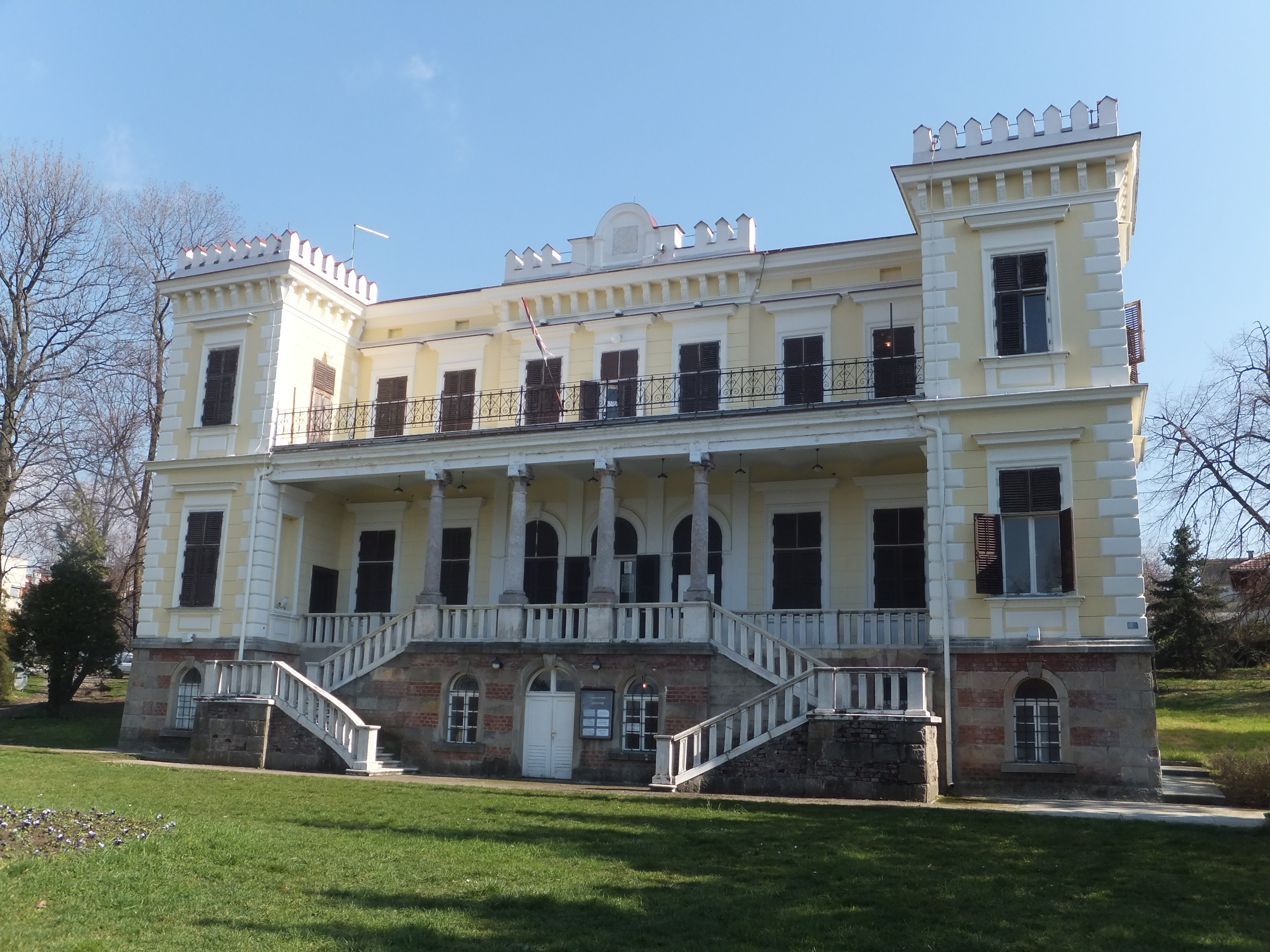 Дворац Белимарковића